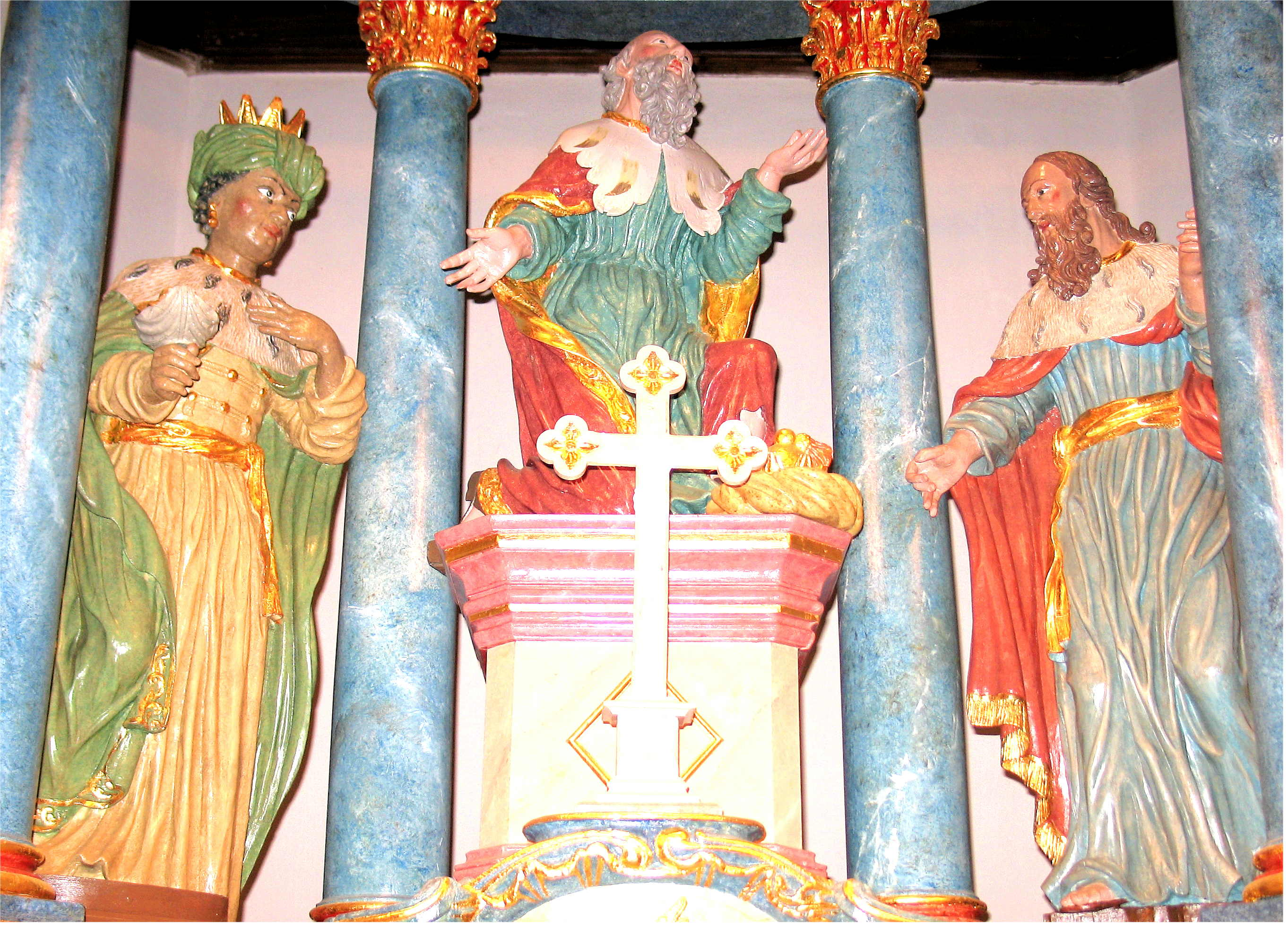 Sujet : Haaptaltor an der Kapell zu Duelem (Garnech) (Abrëll 2006).